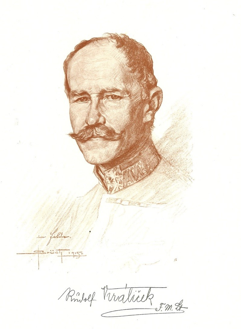 Rudolf Králíček (1862 - 1946), Rakousko-uherský vojenský velitel českého původu.